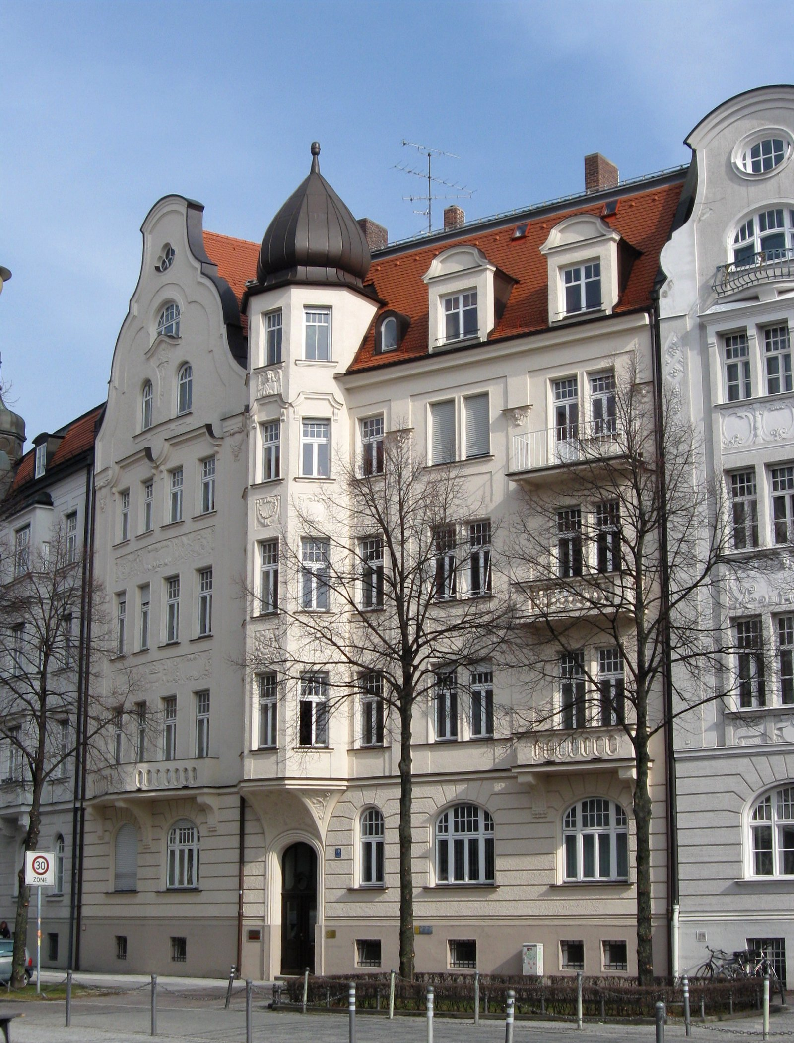 Prinzregentenplatz 19; Mietshaus, malerischer, barockisierender Jugendstil, mit Stuckdekor, 1902-03 von Carl Vent.